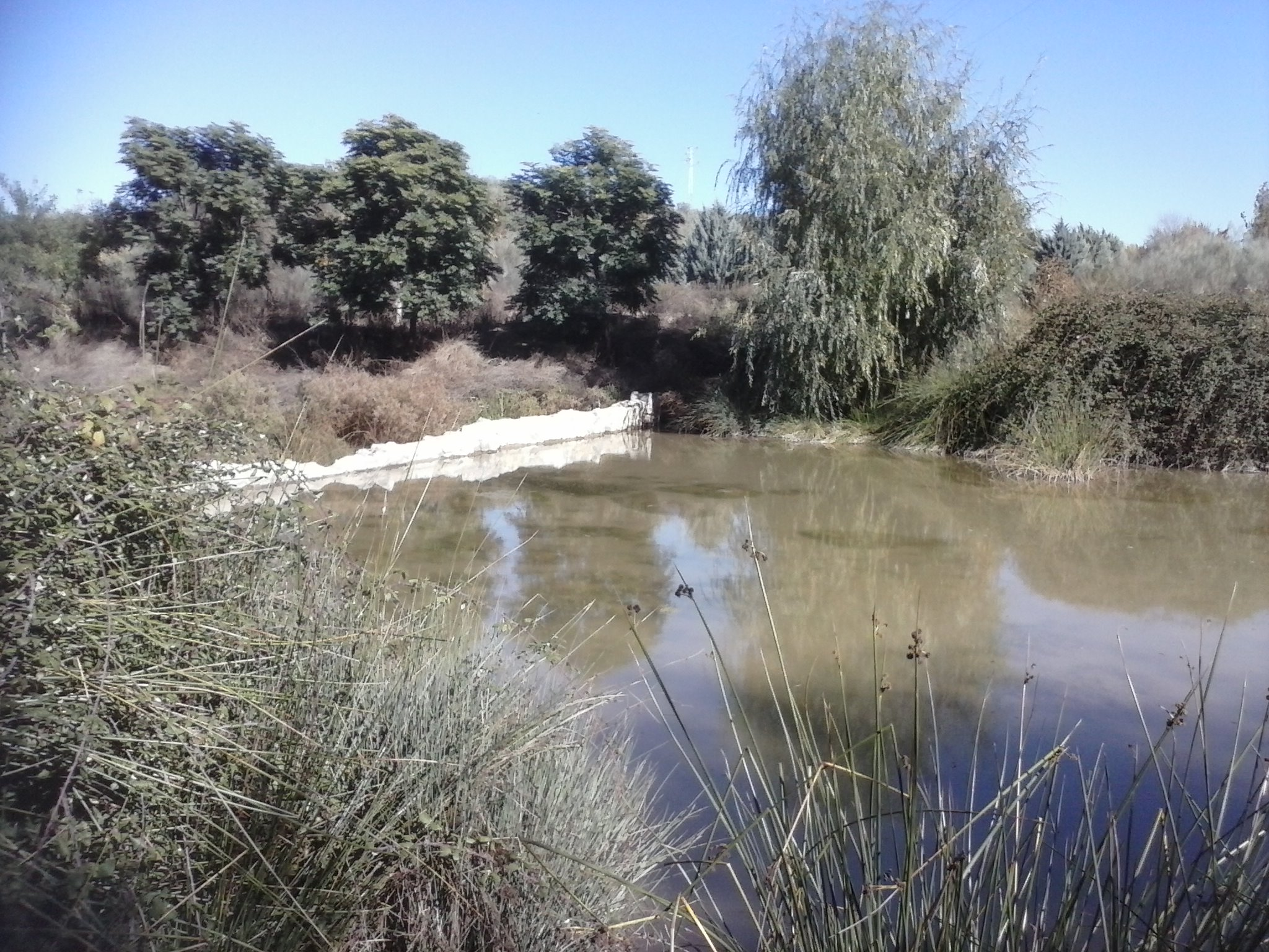 Pequeña presa en el paraje conocido como Los Pinos, municipio de Láchar (provincia de Granada, España).